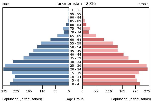 A population pyramid illustrates the age and sex structure of a country's population and may provide insights about political and social stability, as well as economic development. The population is distributed along the horizontal axis, with males shown on the left and females on the right. The male and female populations are broken down into 5-year age groups represented as horizontal bars along the vertical axis, with the youngest age groups at the bottom and the oldest at the top. The shape of the population pyramid gradually evolves over time based on fertility, mortality, and international migration trends.